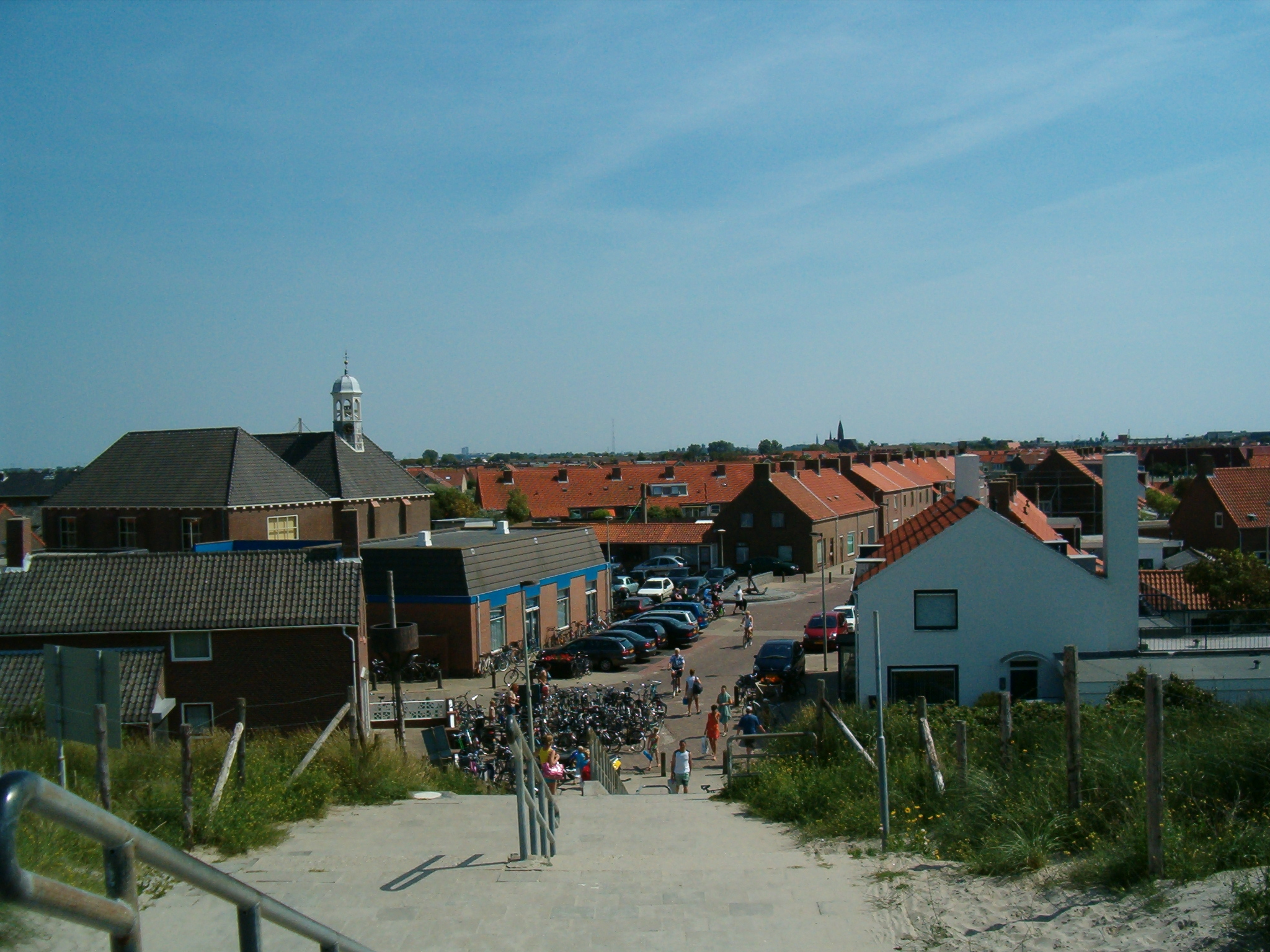 Self made picture of Ter Heijde (Netherlands)